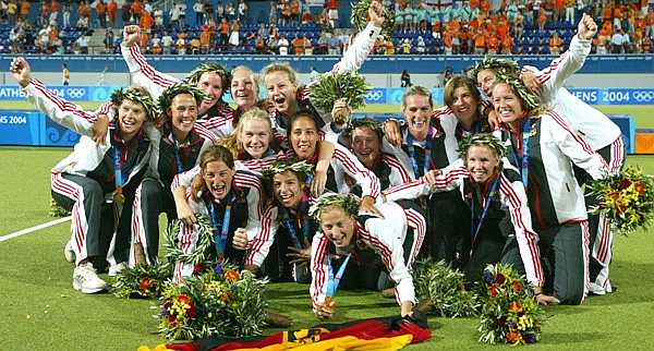 Siegerfoto der deutschen Damen bei den Olympischen Spielen 2004 Athen